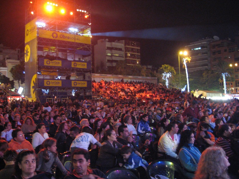 Público en el escenario del carnaval de Las Palmas de Gran Canaria.